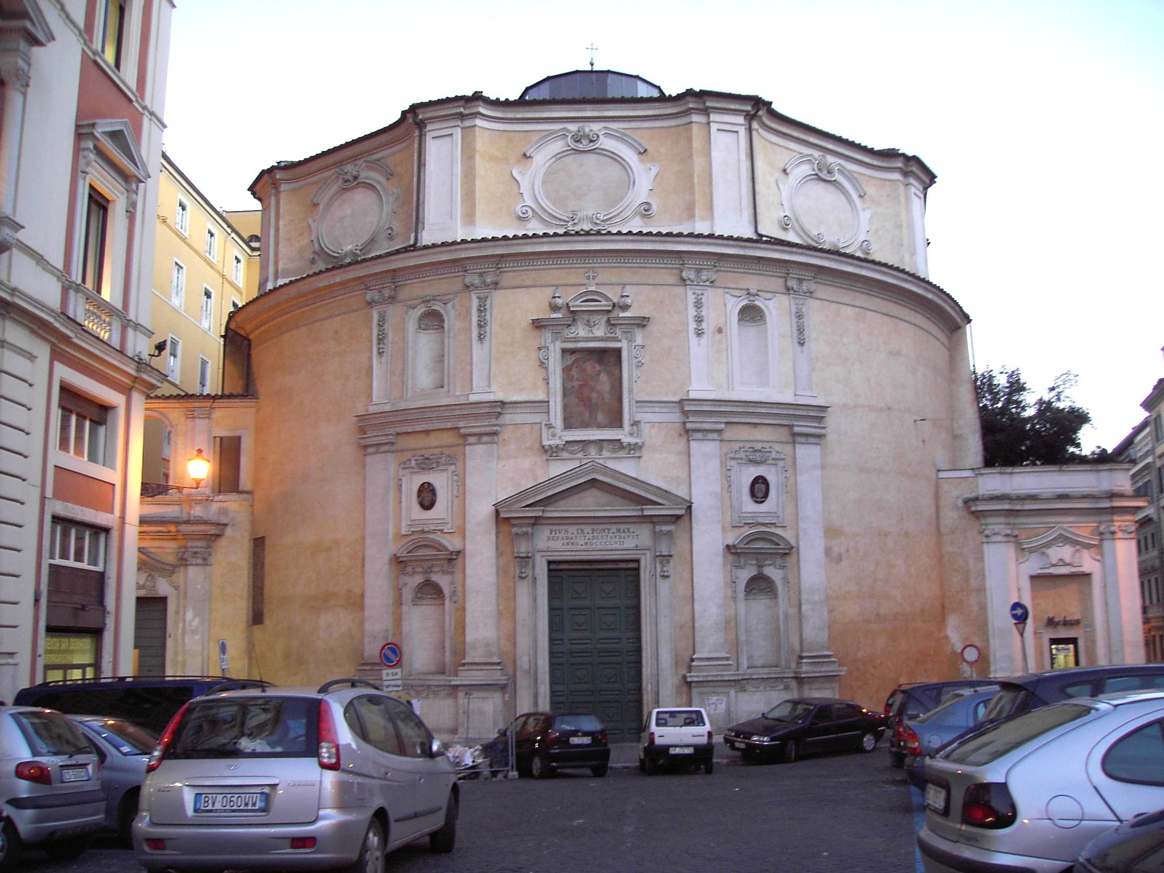 Roma, san Bernardo alle Terme di Diocleziano.